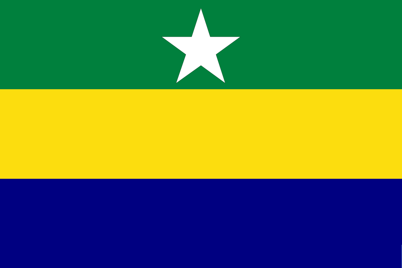 Bandera de Balsas